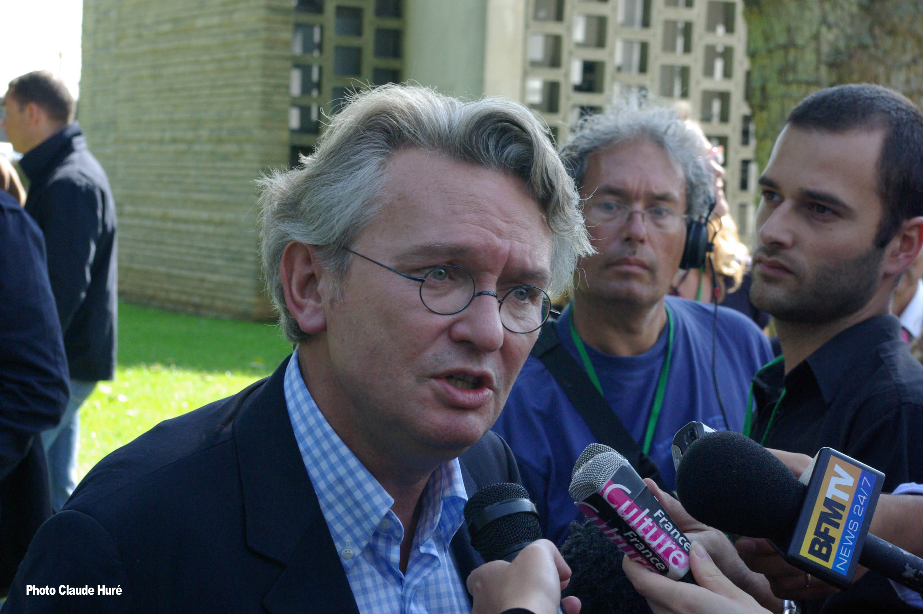 Jean-Claude Mailly.